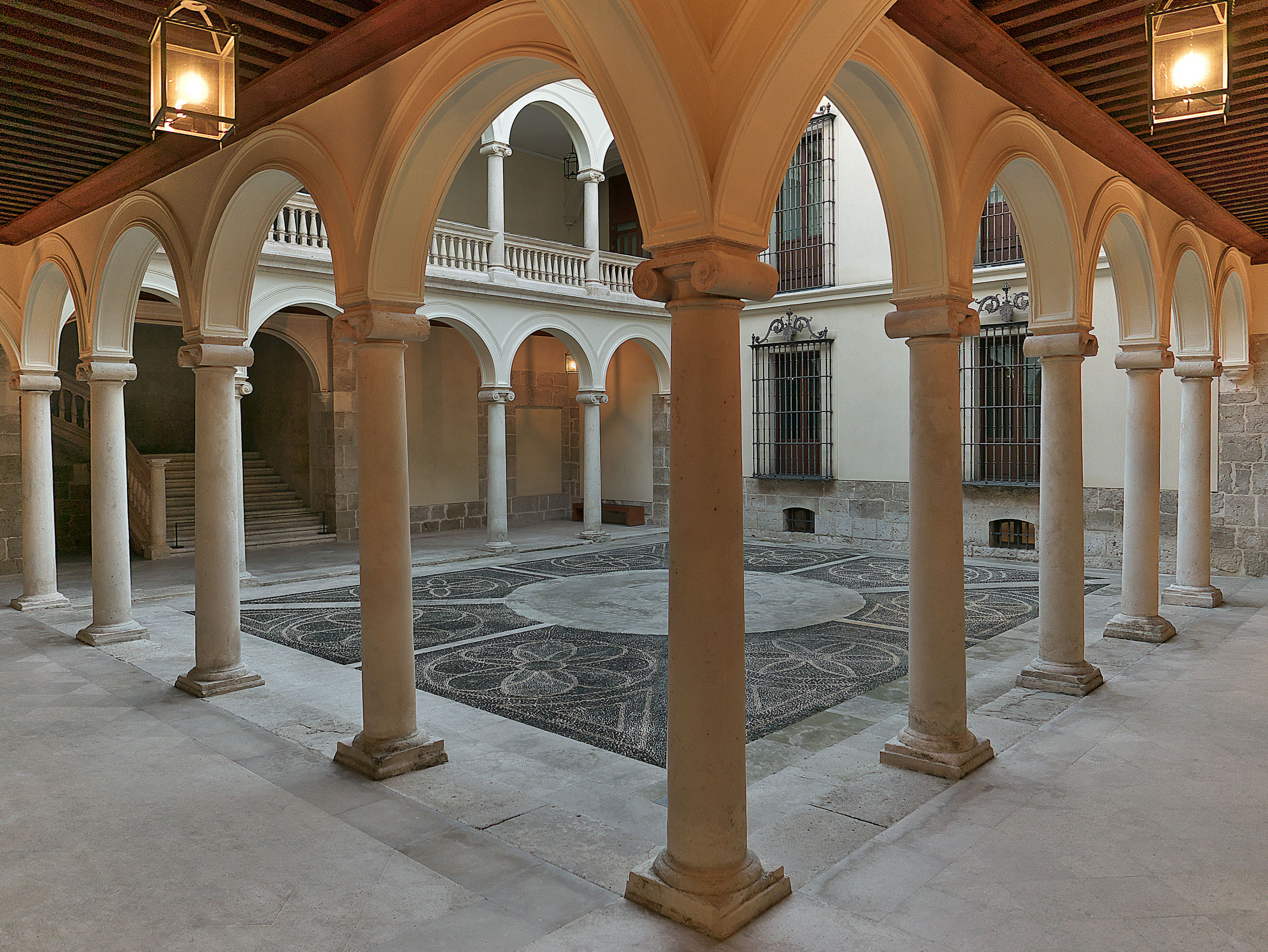 Patio de Francisco de Salamanca para Antonio Velasco y Rojas y Francisca de Silva, su esposa.